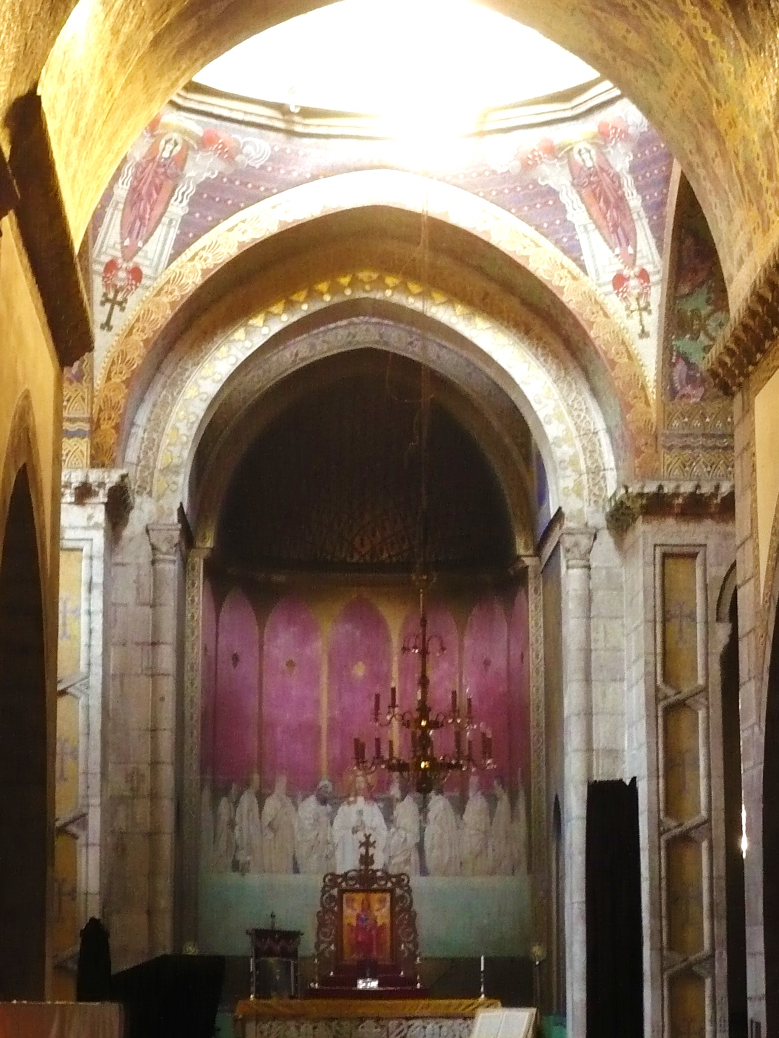 Lwów, ołtarz w Katedrze Ormiańskiej